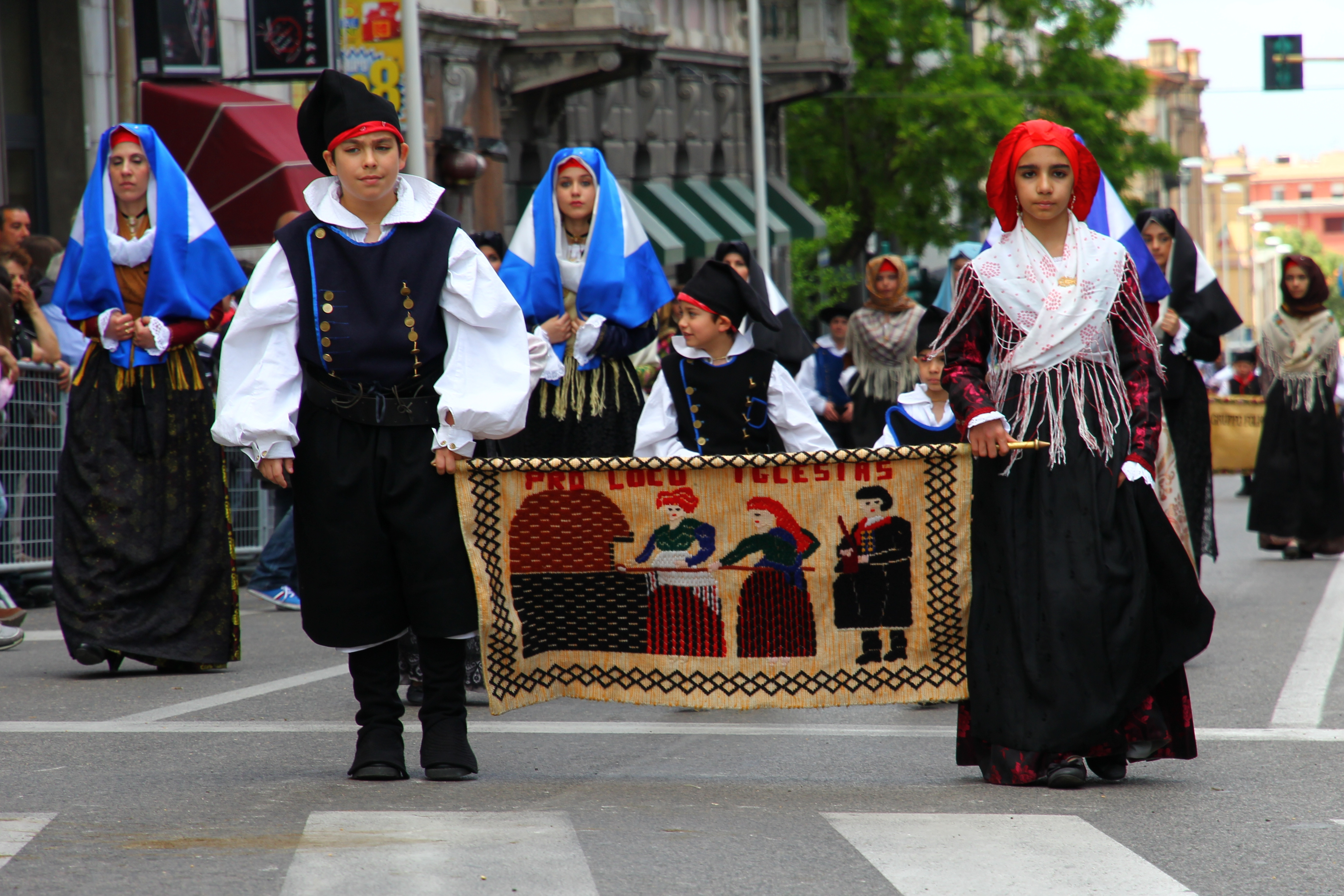 Cavalcata Sarda 2013 (Sassari)